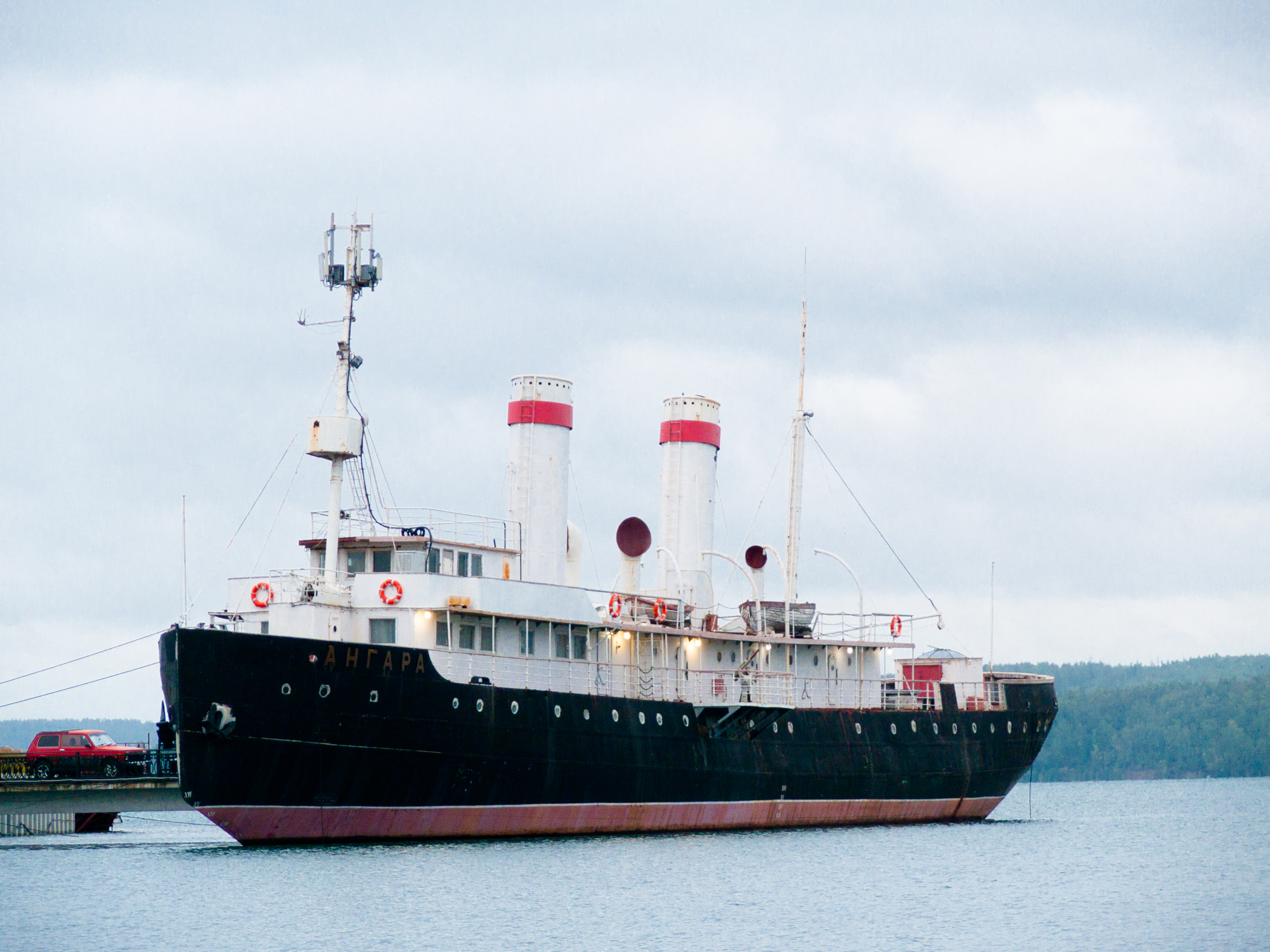 Ледокол Ангара, построенный для плавания по оз. Байкал: Иркутское водохранилище, пос. Мельничная падь, Иркутск, Иркутская область